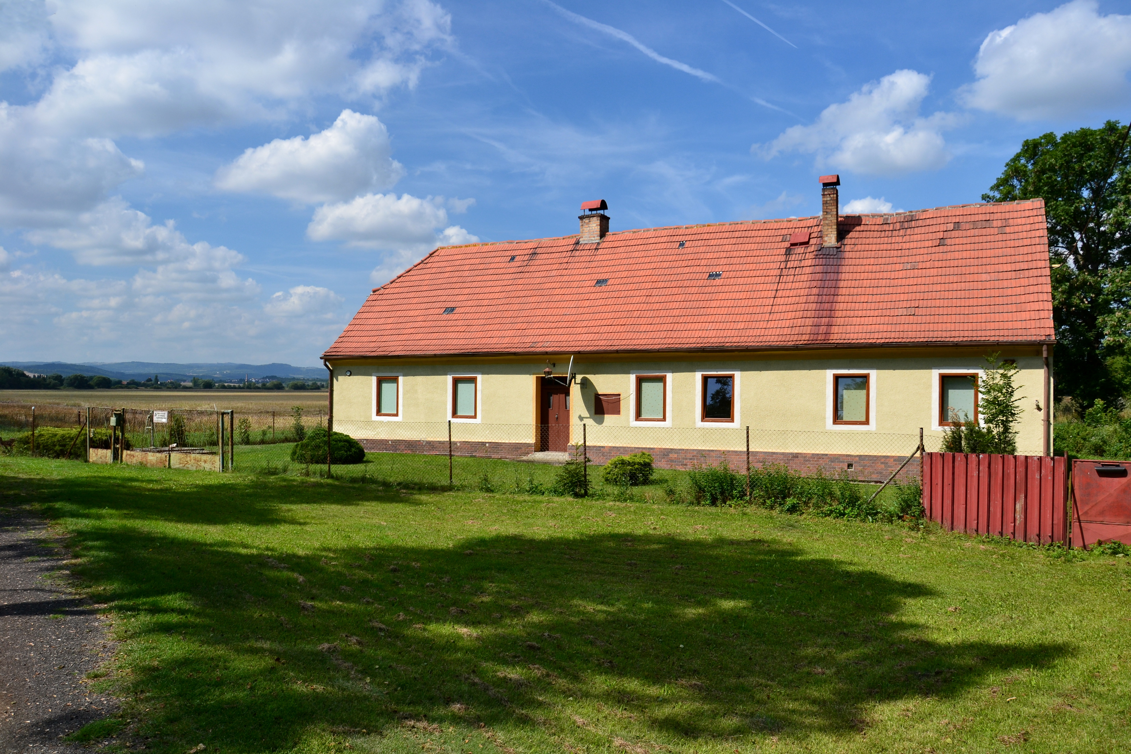 Vidolice čp. 22